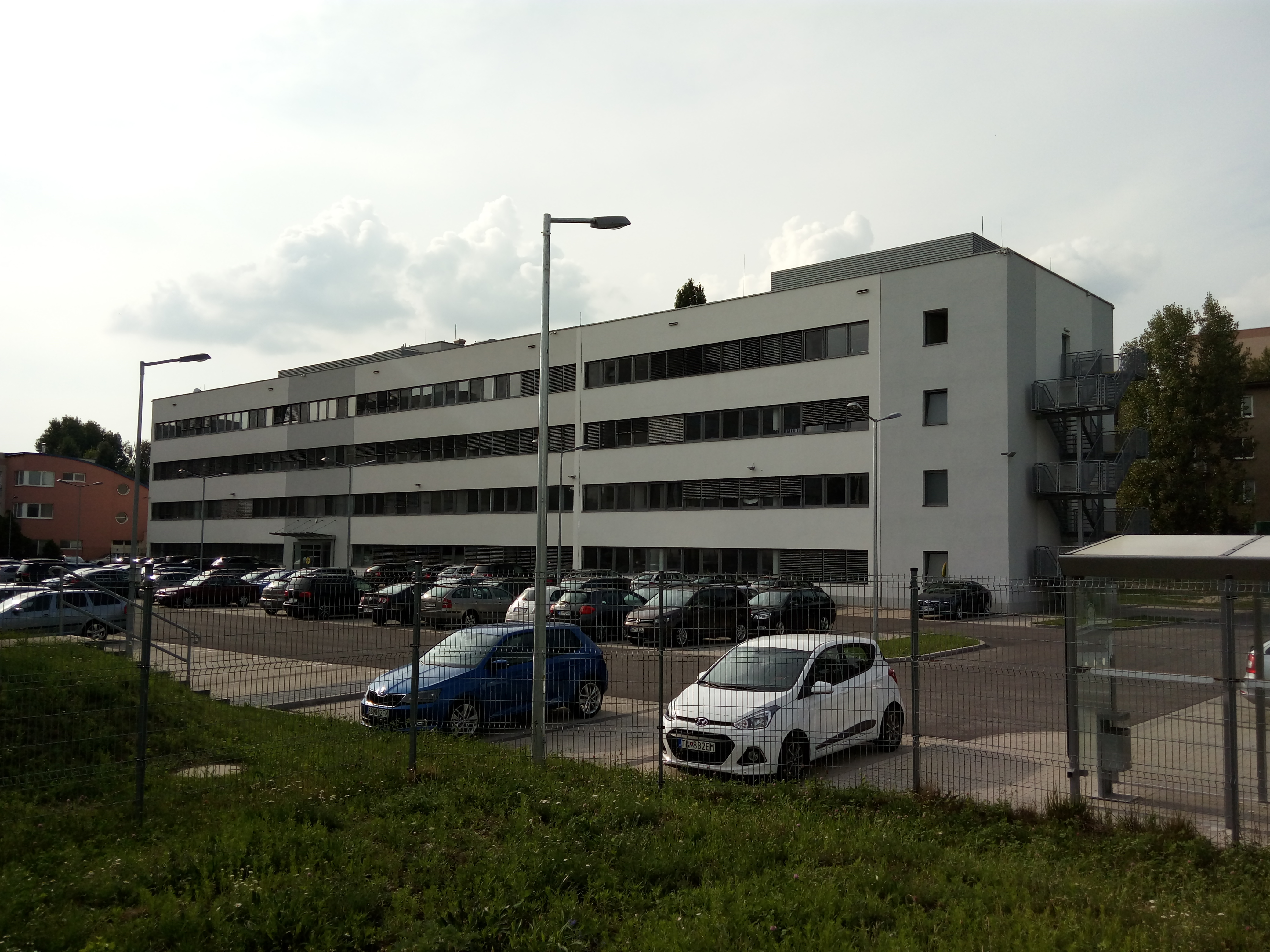 Lidl centrála, Ružinovská 1/e, Ružinov, Bratislava